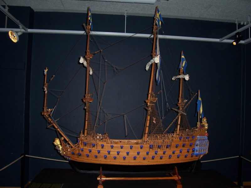 Modell des Schiffes Kronan